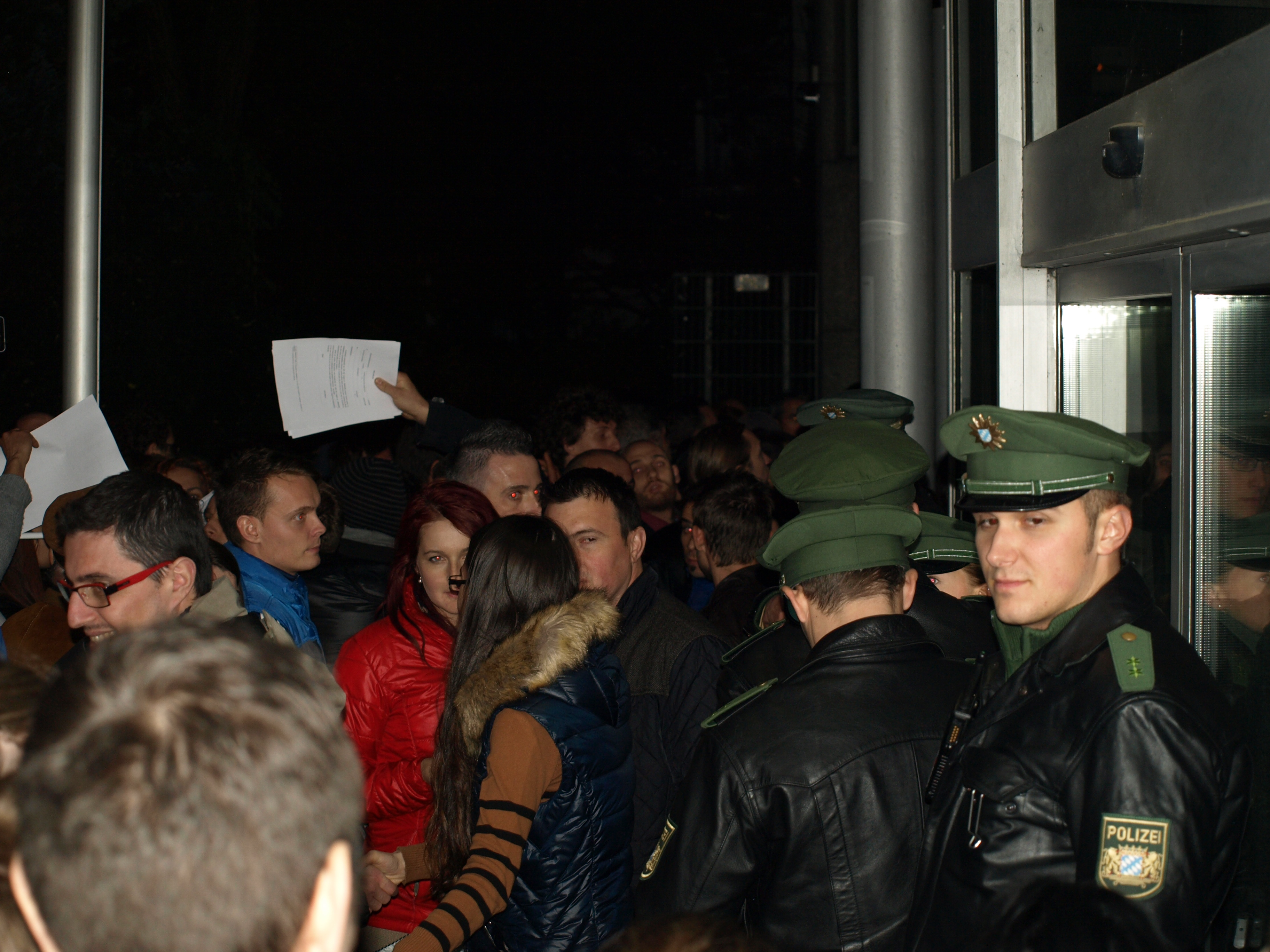 Vot și proteste la München 2 noiembrie 2014 Dan Mihai Pitea